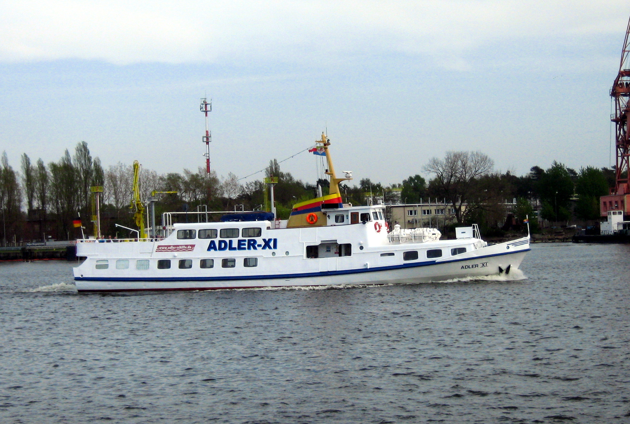 Adler-XI.